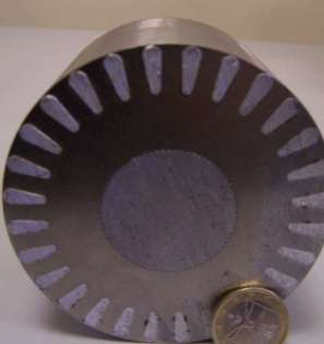 Coupe du rotor d'une machine asynchrone